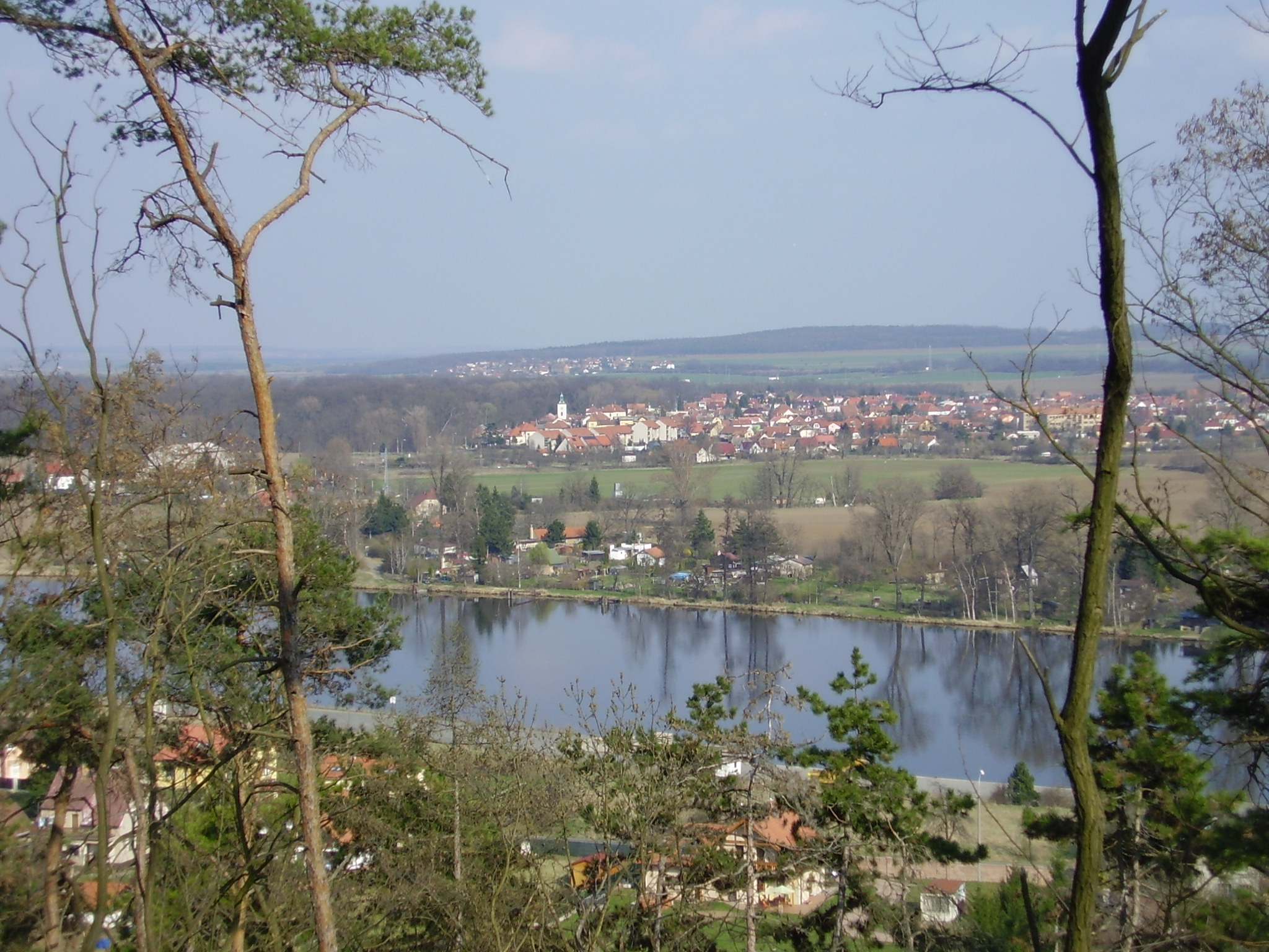 Veltrusy - celkový pohled